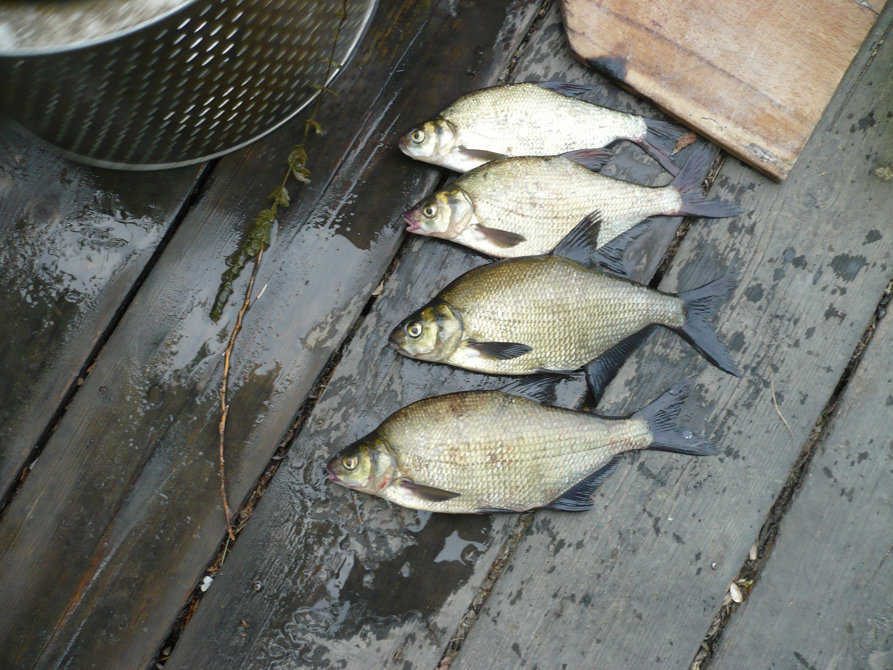 Dunából kifogott dévérek Bezdánnál